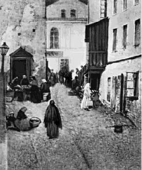 Street in Vitebsk, Belarus